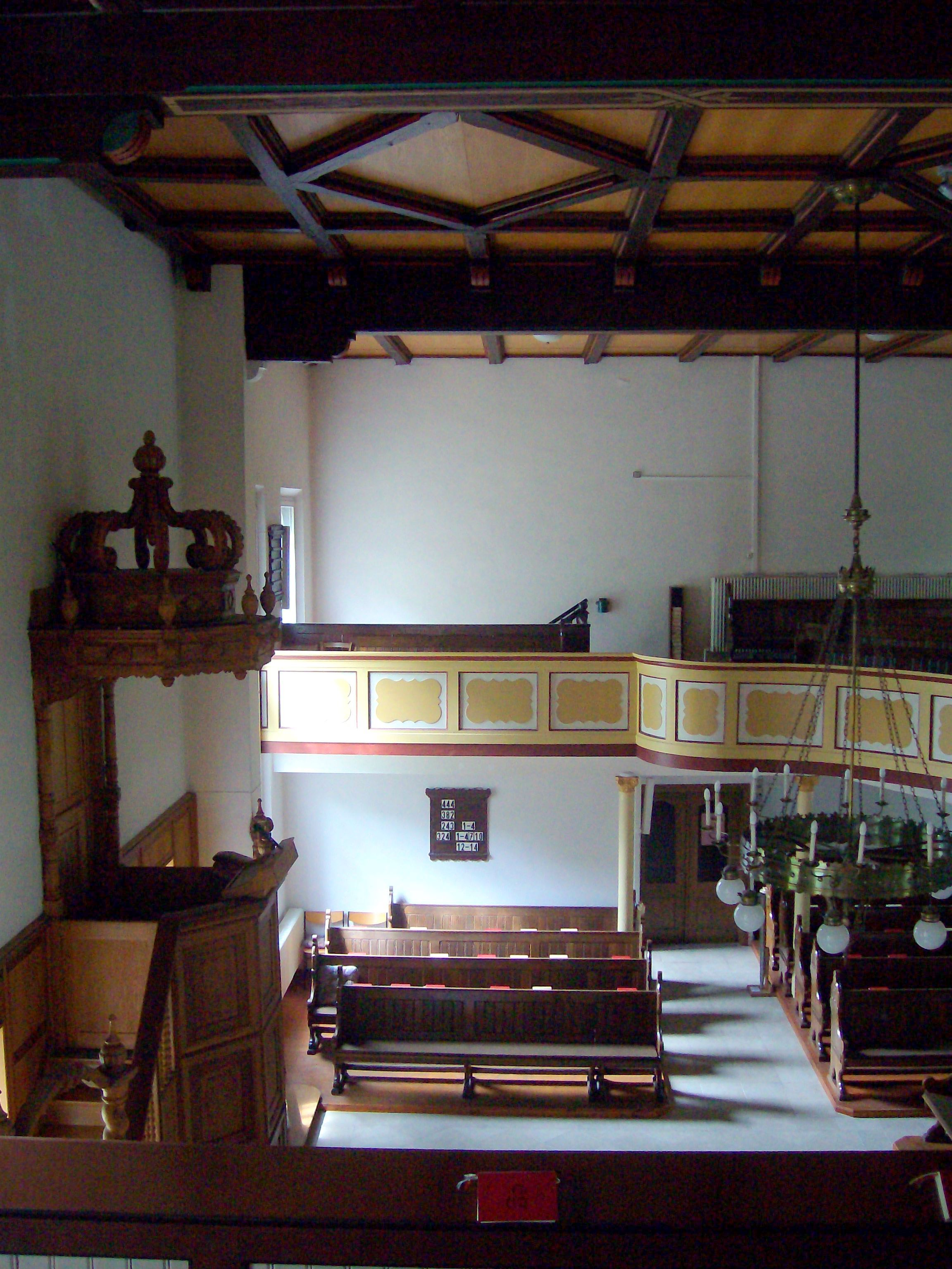 Innenraum der Reformierten Kirche in Oldersum